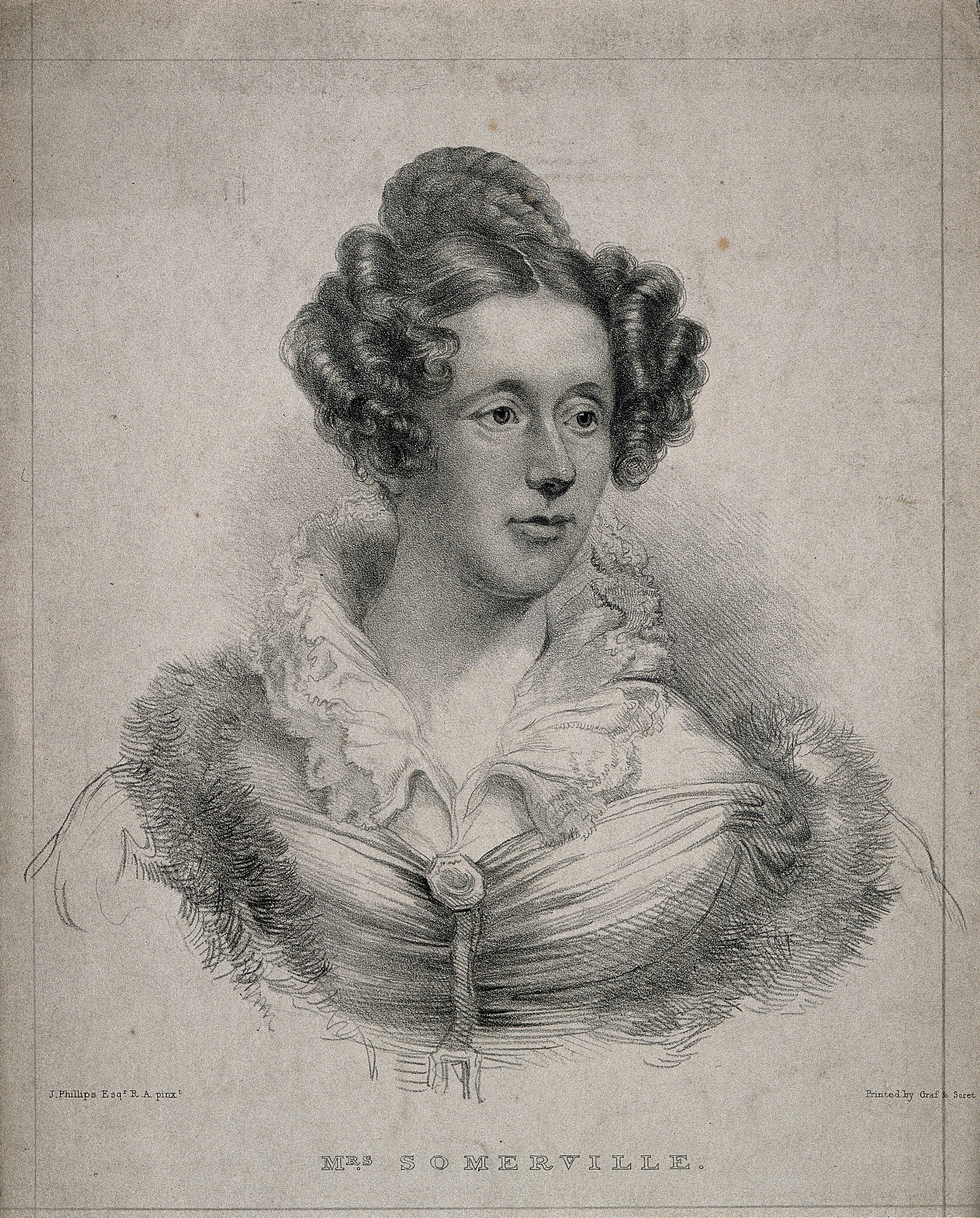 Genre/Technique: Portrait prints. Lithographs. Subject name: Somerville, Mary, 1780-1872.